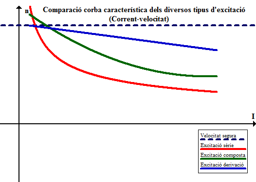 Aquesta és la comparació de les corbes característiques dels motors d'excitació sèrie, composta i derivació en relació a la intensitat de la càrrega i la seva velocitat.